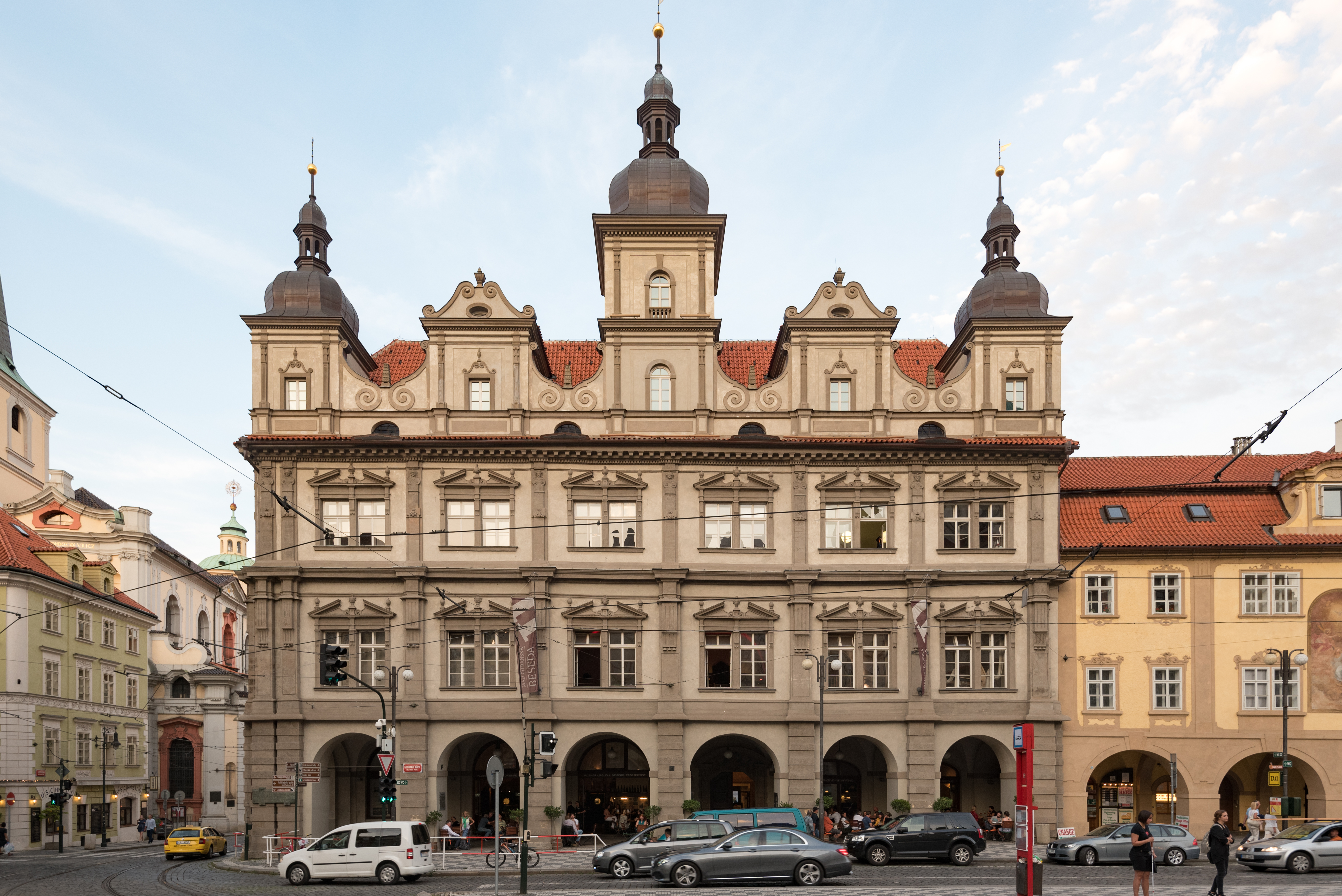 Praha 1, Malostranské náměstí 35-21, Letenská 35-27